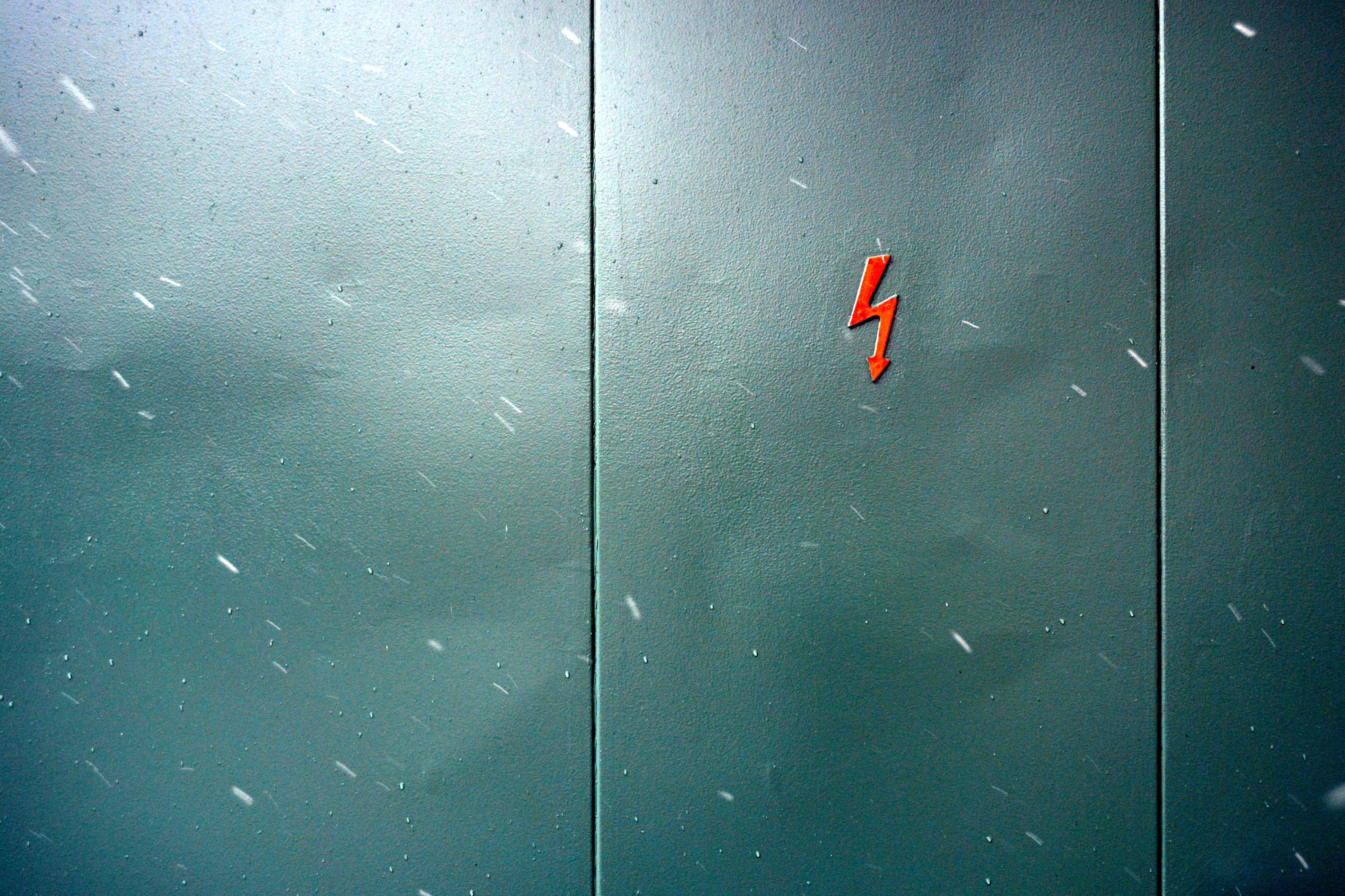 High Voltage